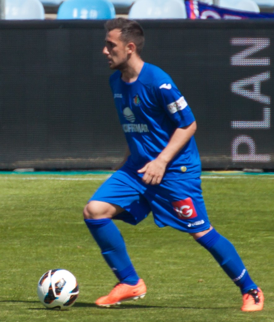 Paco Alcácer amb la samarreta del Getafe, 2013